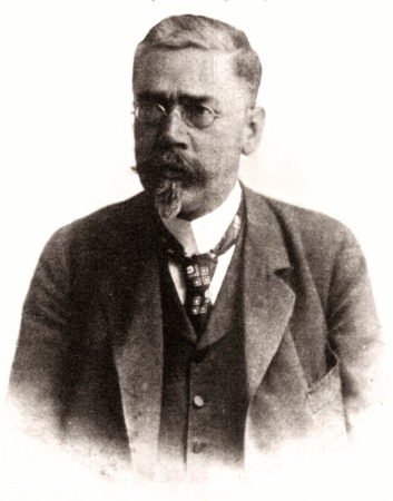 austrian inventor and ingenieur Karl Gölsdorf